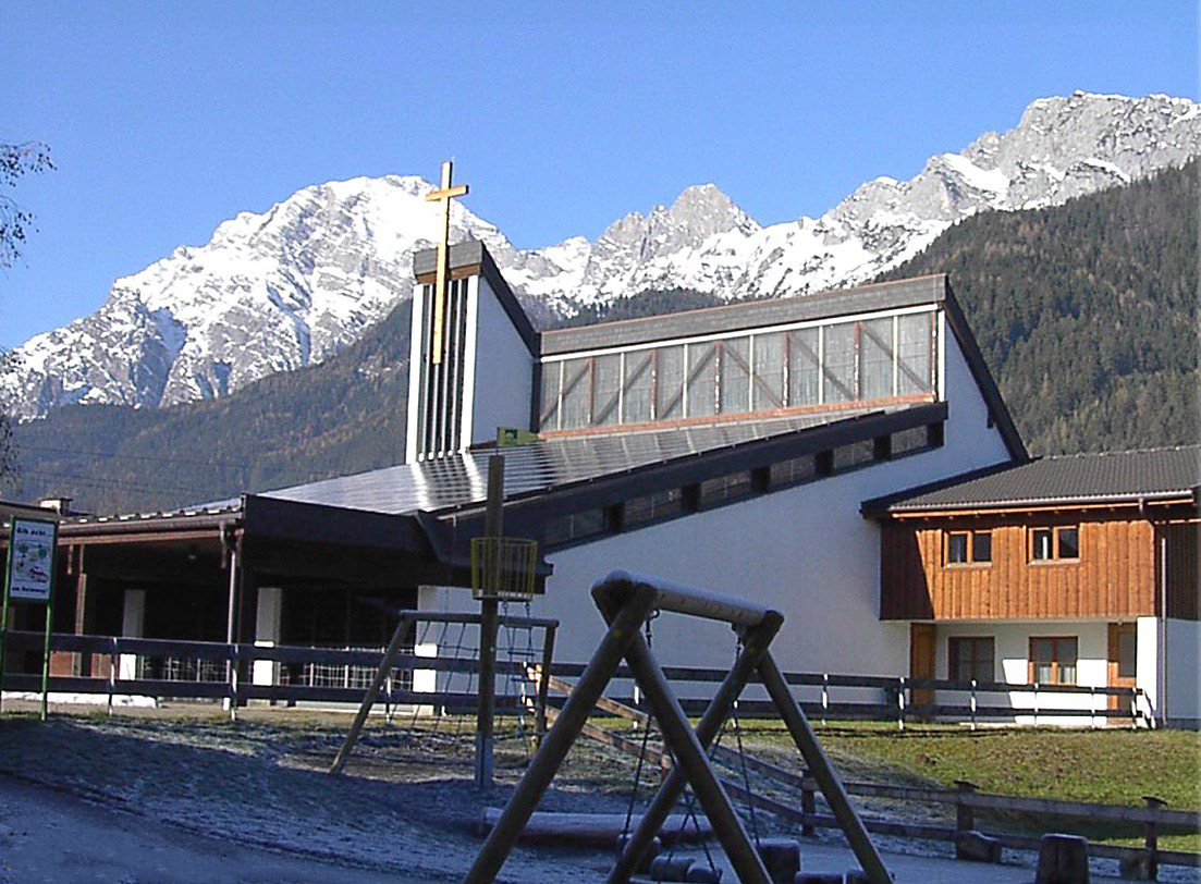 Saalfelden 2004 - eigene Digitalfotografie